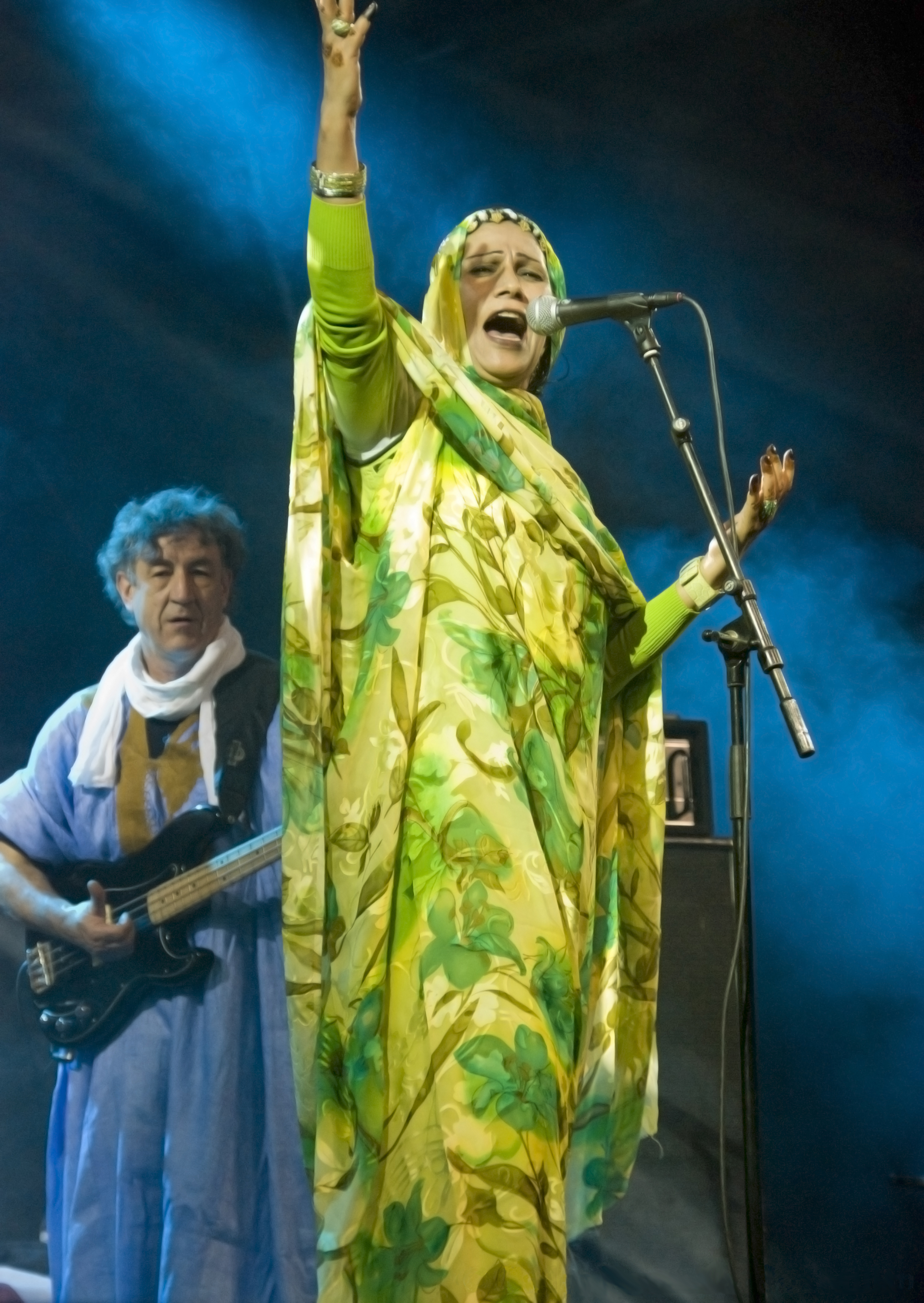 Mariem Hassan: Los saharauis ensalzan a Mariem Hassan como una auténtica embajadora. Mariem se ha convertido en un símbolo de resistencia y una renovadora del haul, canto tradicional saharaui. Saharans extol Mariem Hassan as a true ambassador. Mariem has become a symbol of resistance and a renewal of the haul, traditional Sahrawi singing.